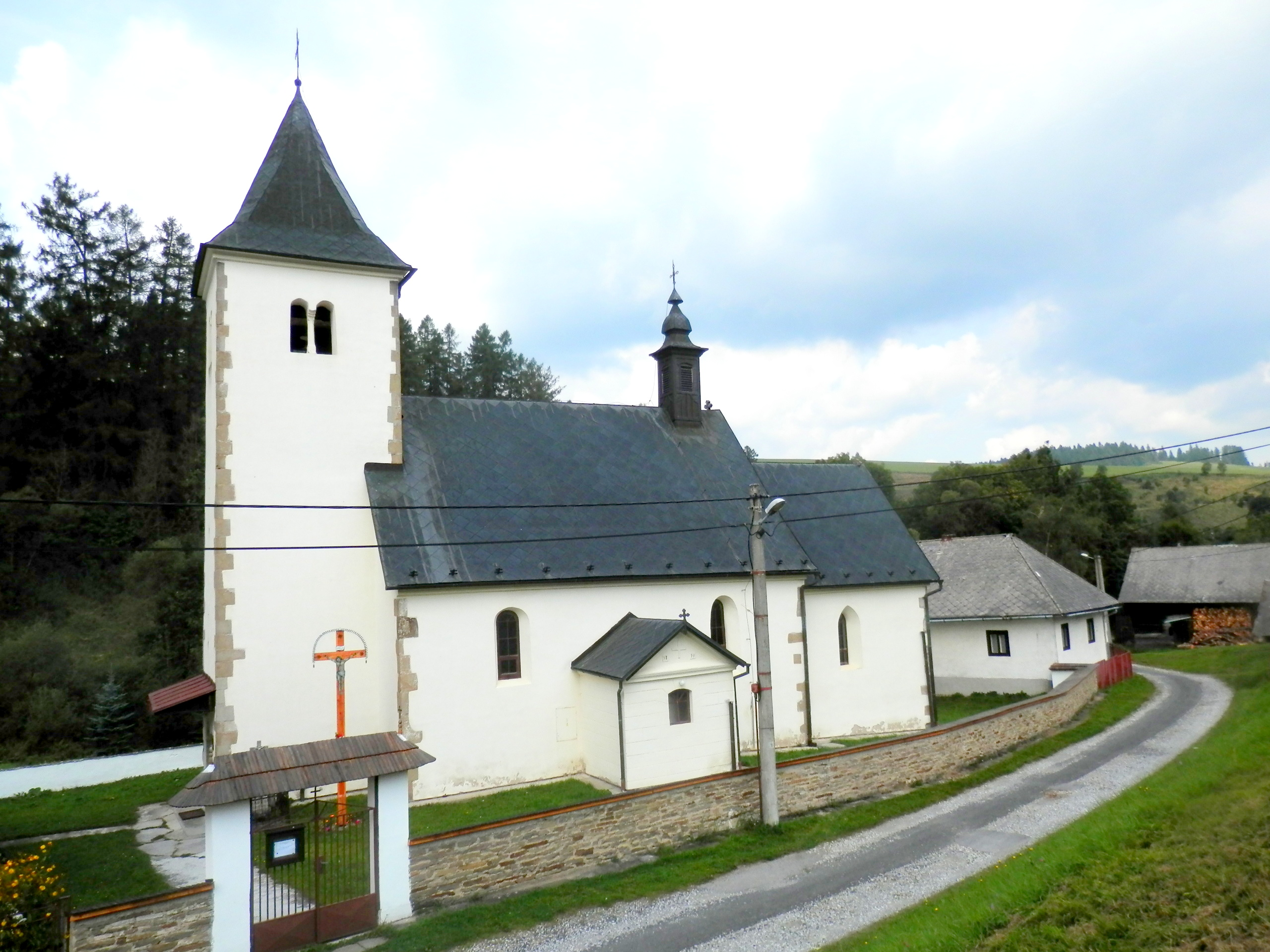 Chrám sv. Anny pochádza z prelomu 13. a 14.storočia. Obec Nižné Repaše, okres Levoča.